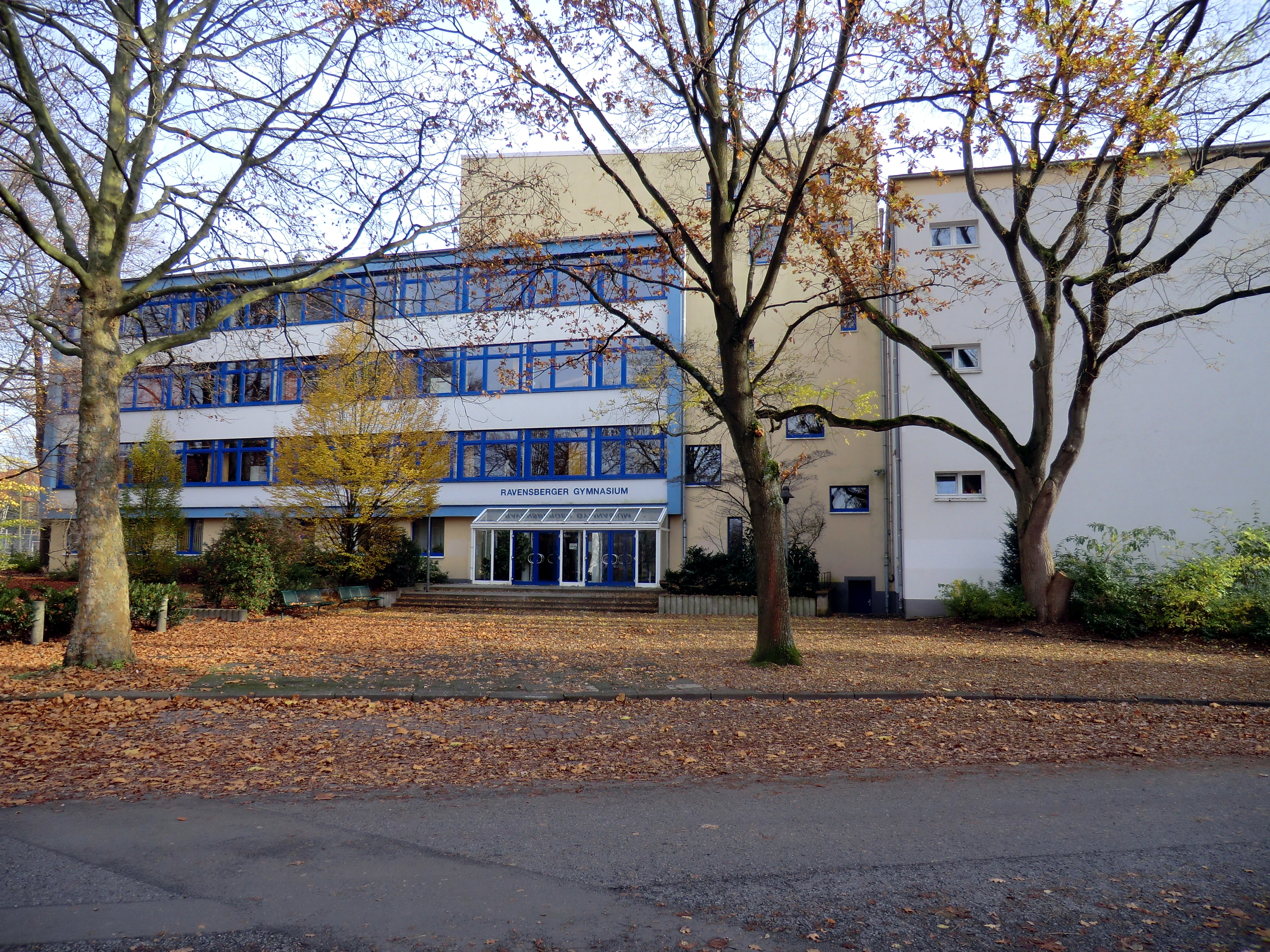 Front Ravensberger Gymnasium